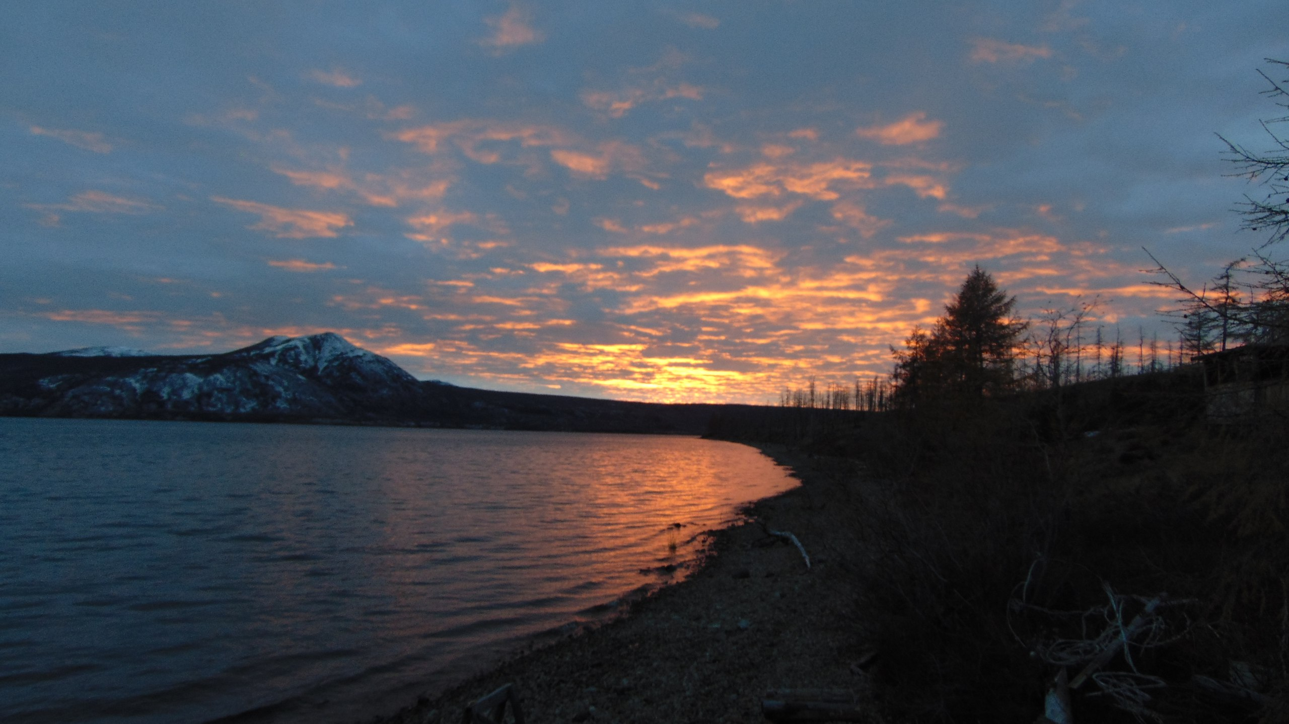 Озеро Лабынкыр (Якутия, Оймяконский улус), июль, закат, вид с южного берега, направление съёмки - северо-восток